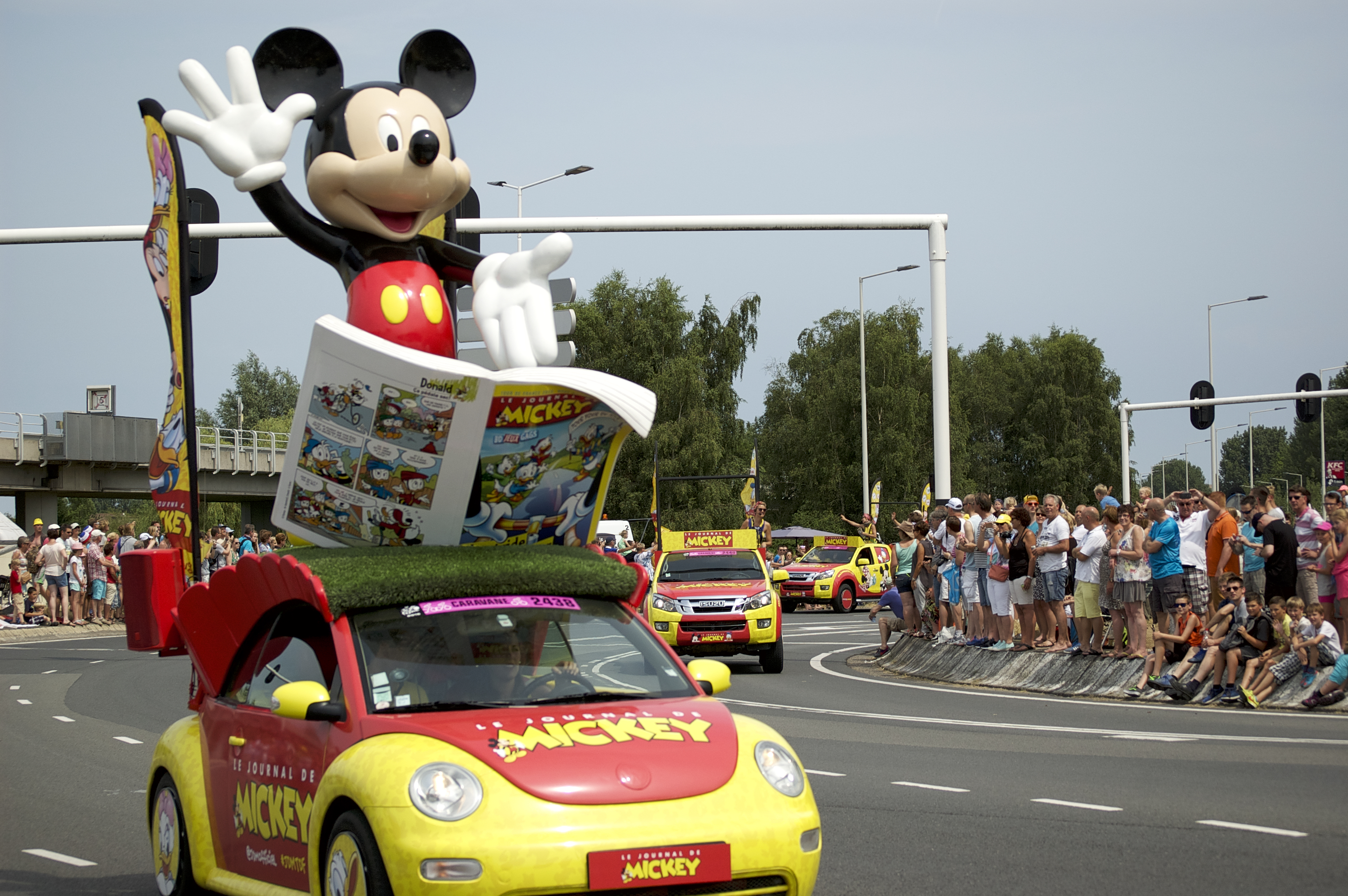 Tourkaravaan, Capelle aan den IJssel.